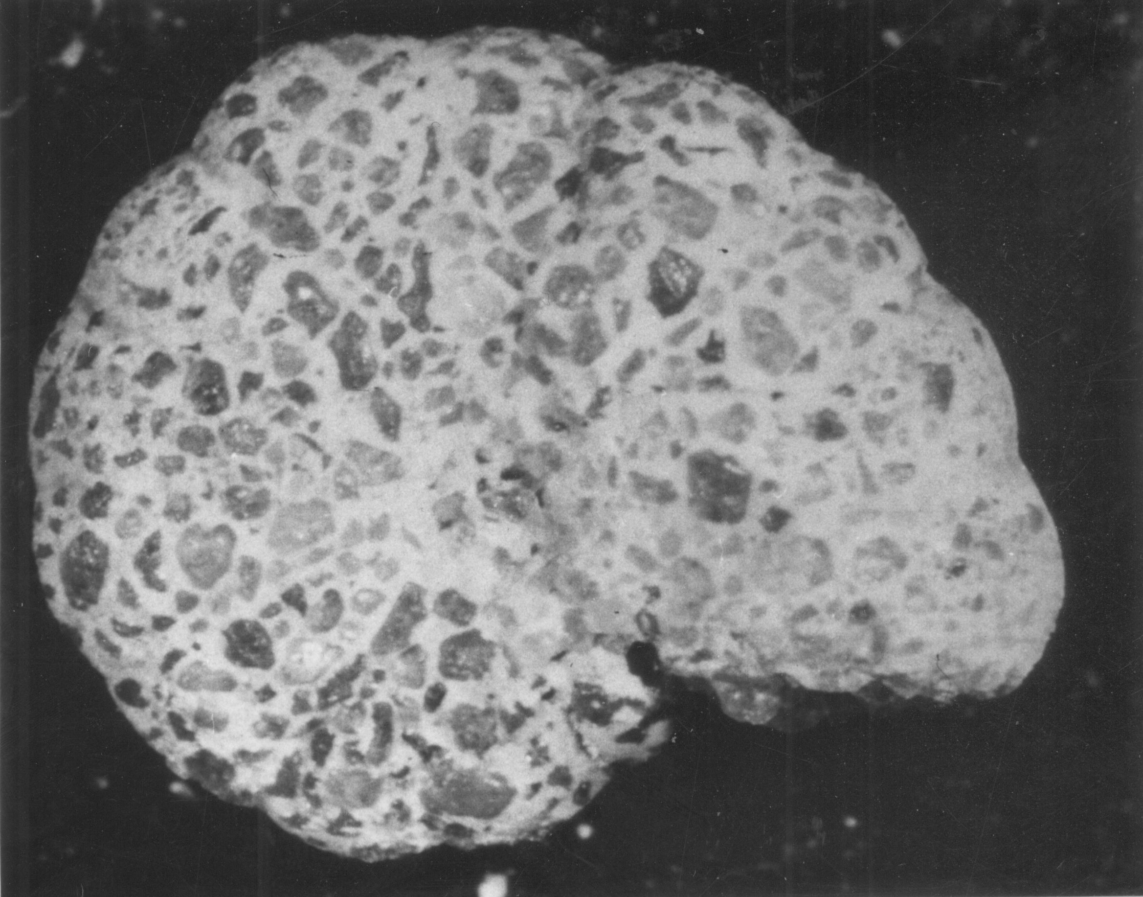 Foraminifera Cribostomoides jeffreysii